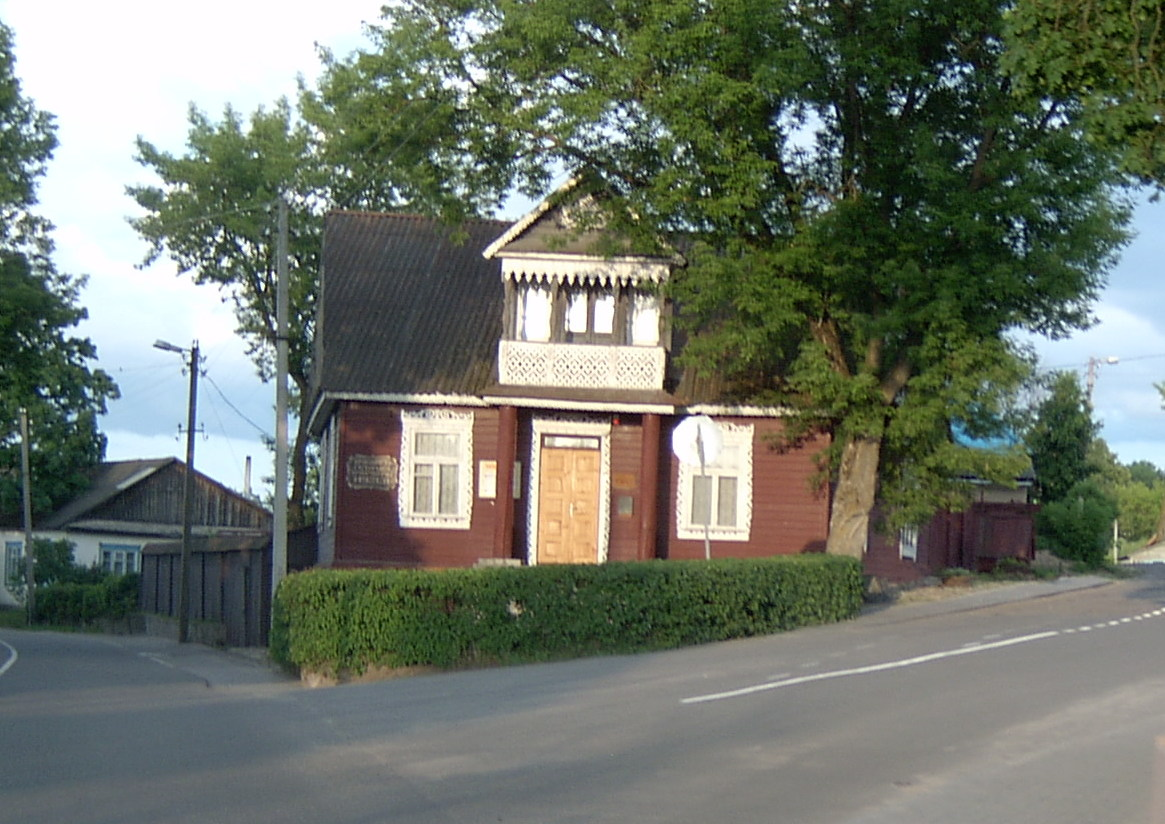 музей